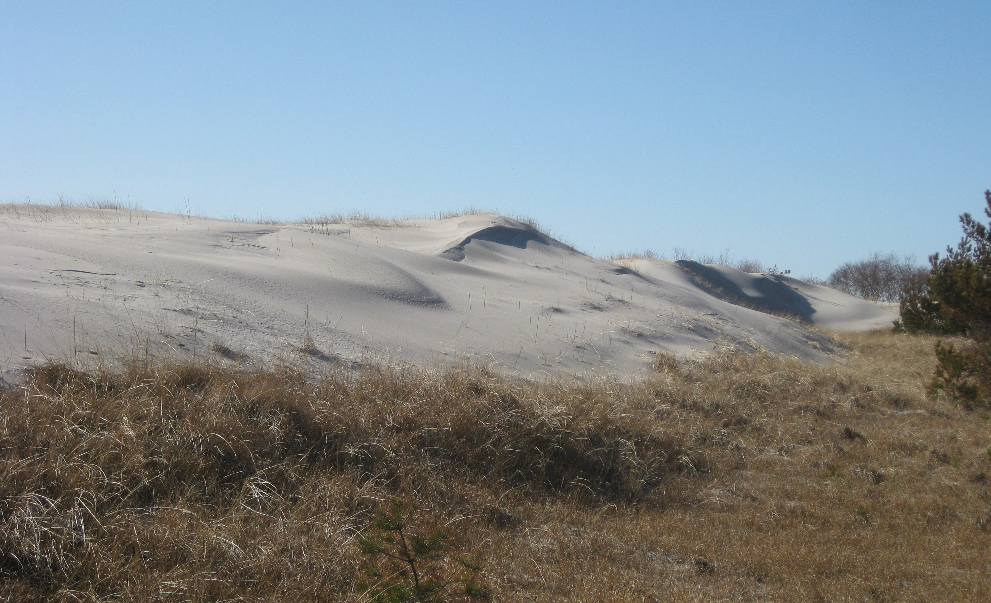 Sanddrivor i Hagestads naturreservat